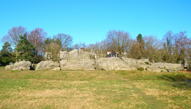 Wellington Rocks